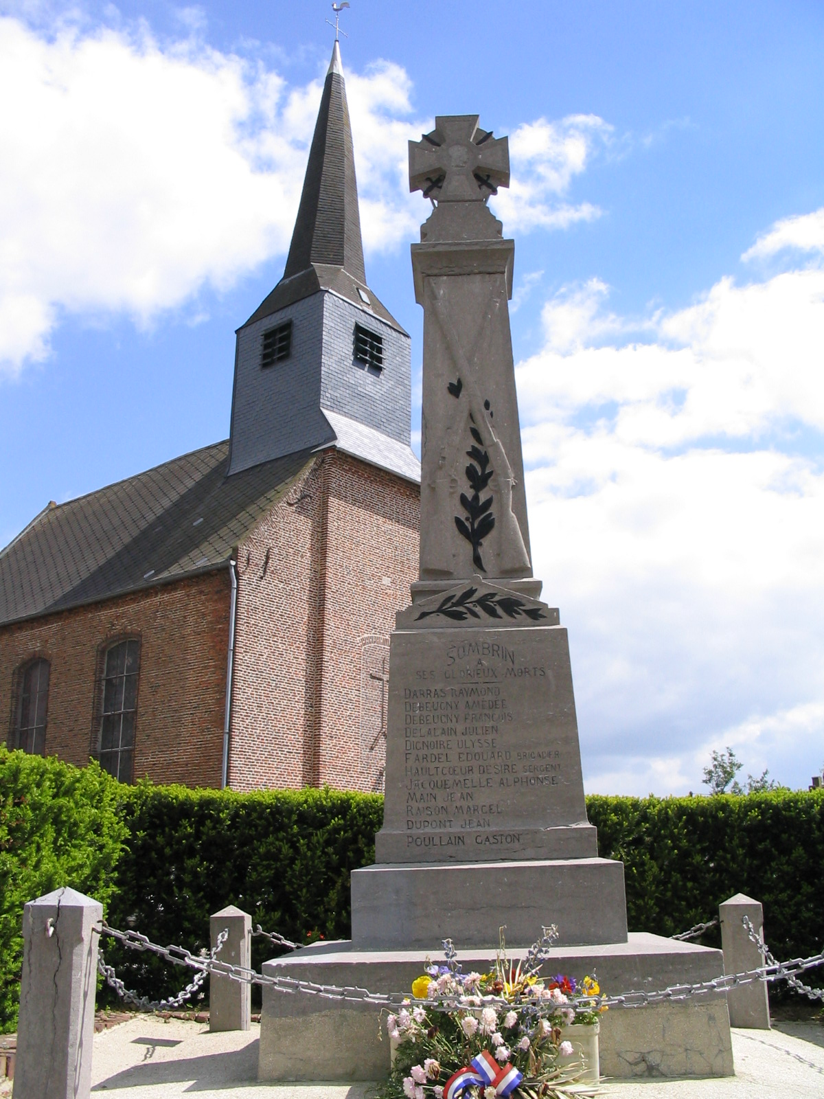 Le monument aux morts devant l'église.